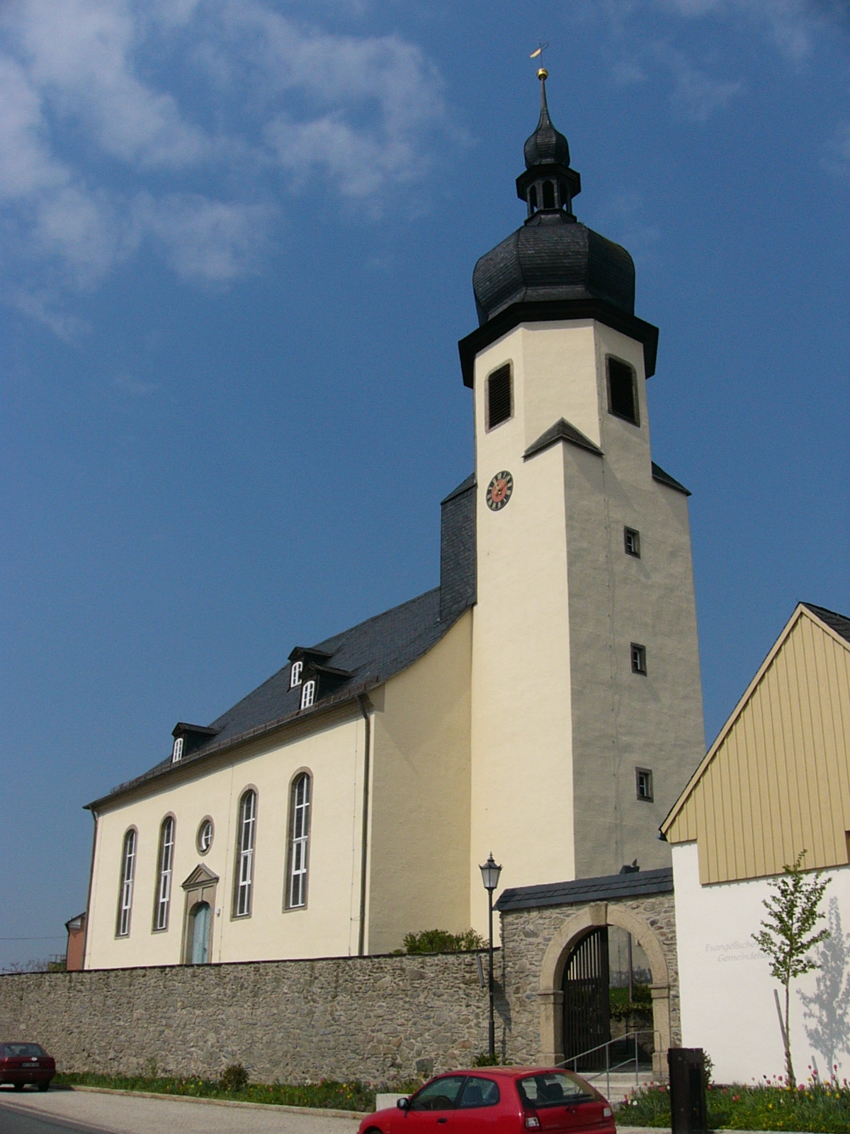 Kirche von Trogen